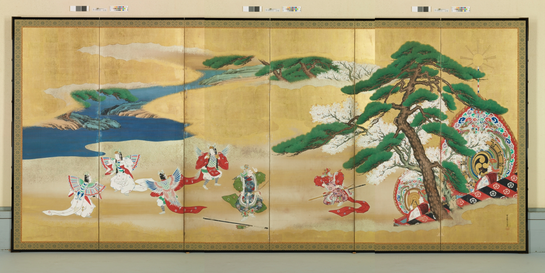 作家名：狩野永岳 所蔵先：東京国立博物館